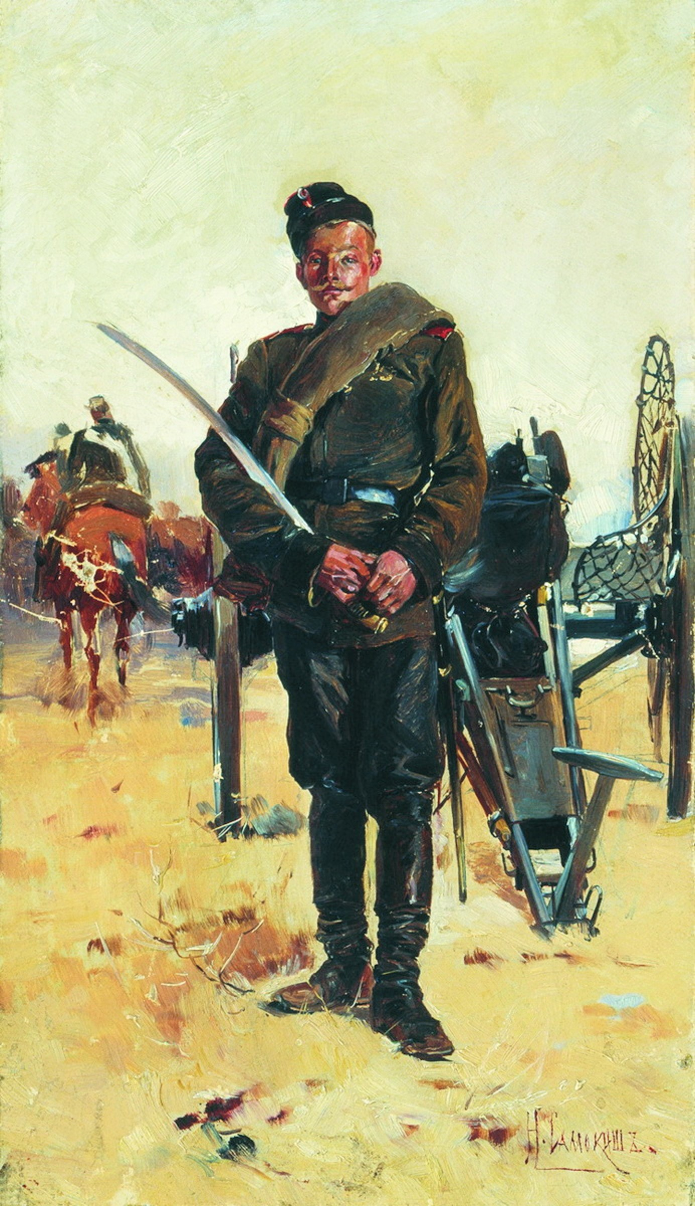 Николай Самокиш. Русский солдат у орудия (42-лин. батарейная пушка образца 1877 года). Холст, масло. Военно-исторический музей артиллерии, инженерных войск и войск связи (Санкт-Петербург)